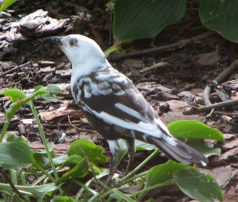 Leucistic (piebald) common grackle, Glen Ellyn Illinois USA